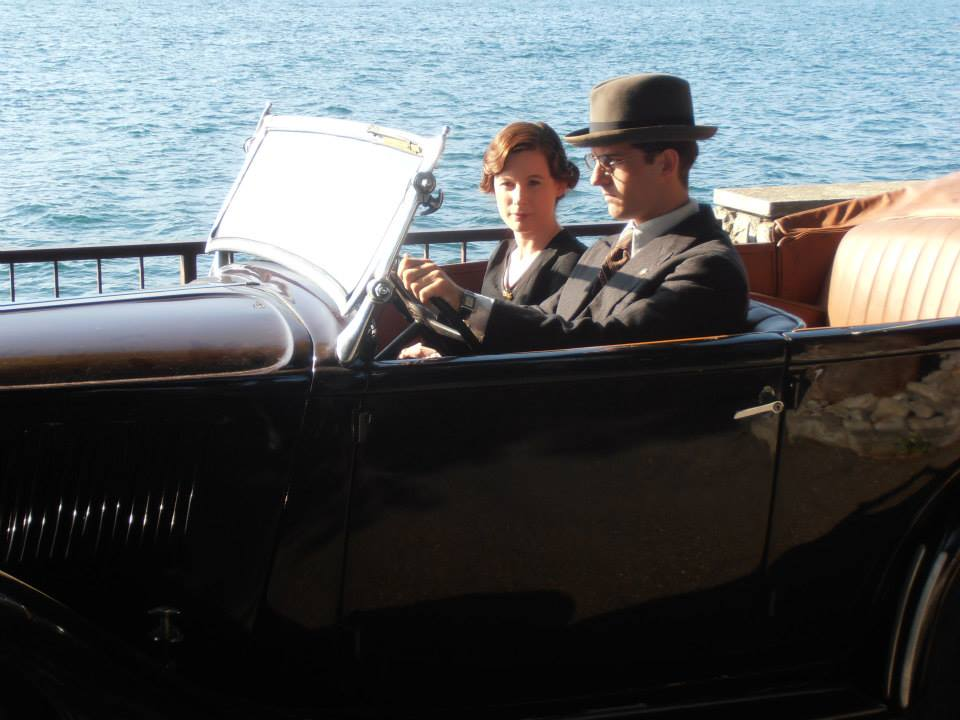 Gli attori Sarah Maestri e Mattia Zaccaro Garau a bordo di una Fiat Balilla per le riprese del film "Il pretore" di Giulio Base. Foto scattata sul lungolago di Luino.